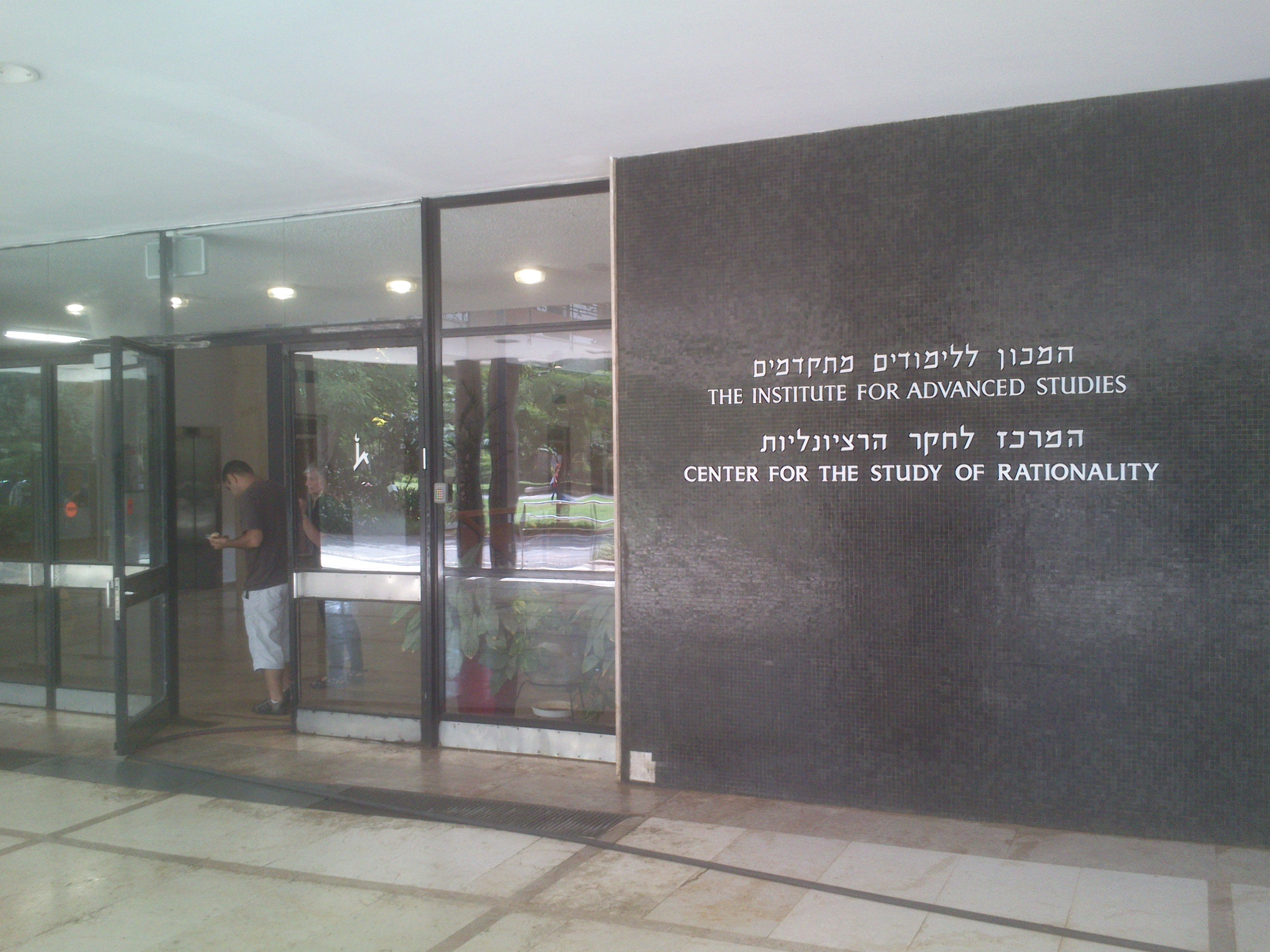 המרכז לחקר הרציונליות